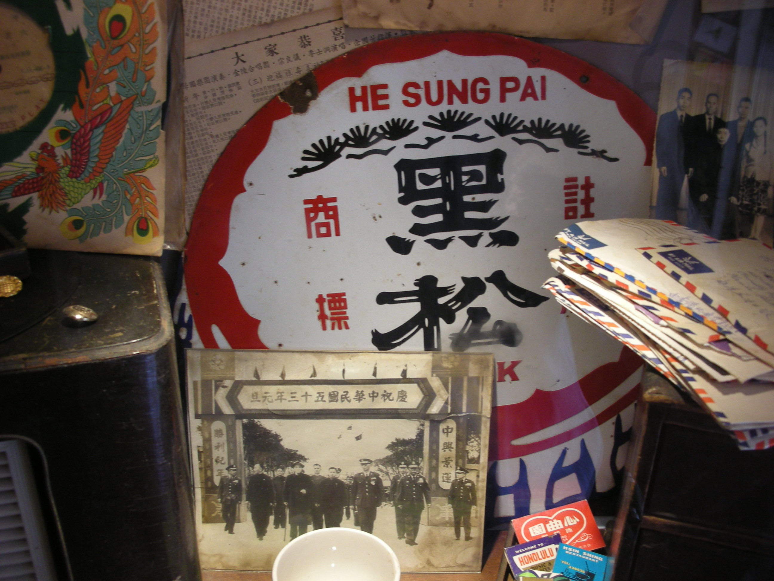 西門紅樓1樓展示的黑松公司零售商鐵牌與中華民國53年元旦牌樓照片。